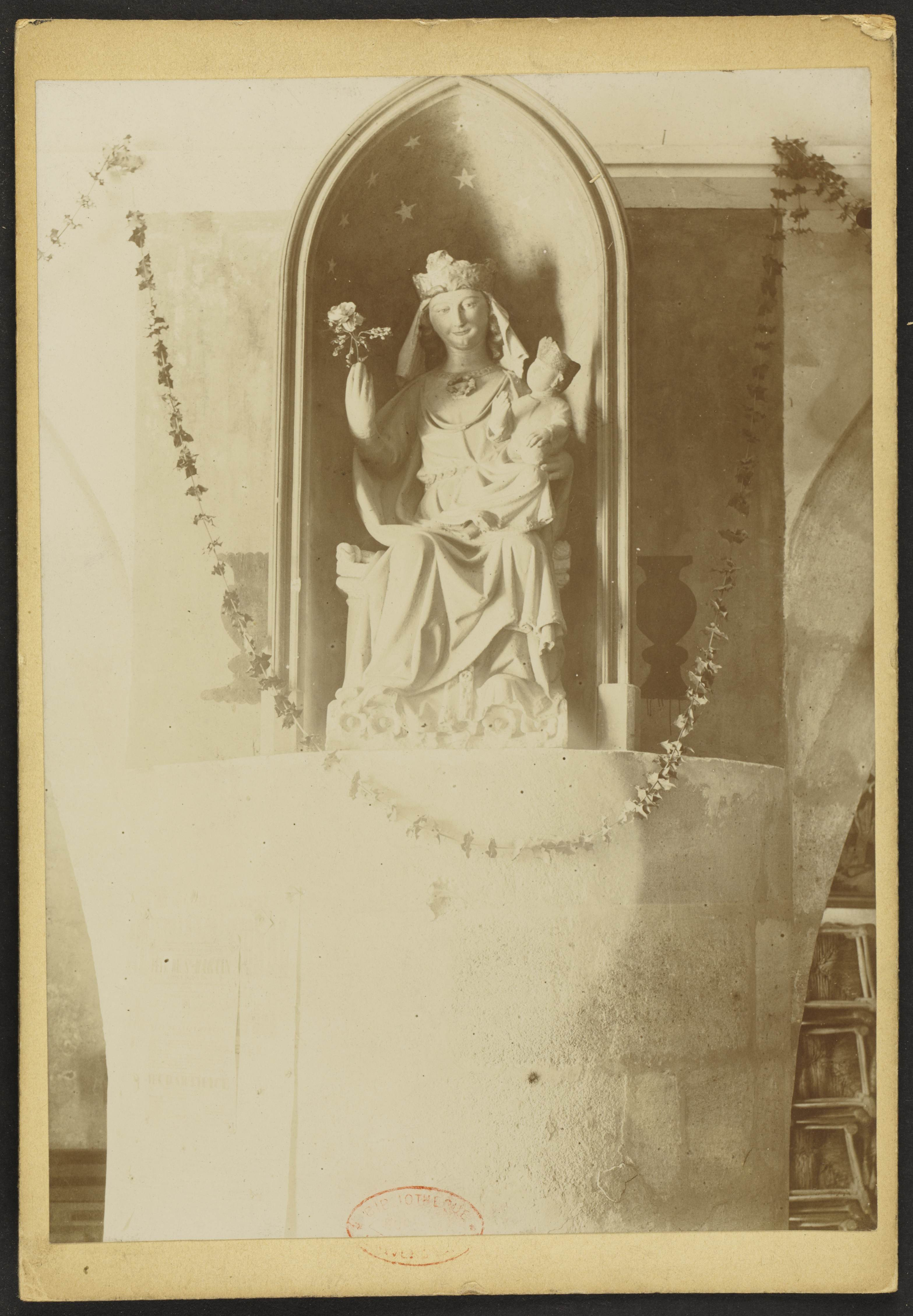 Eglise Saint-Pierre de Lagorce; Statue de La vierge à l'enfant